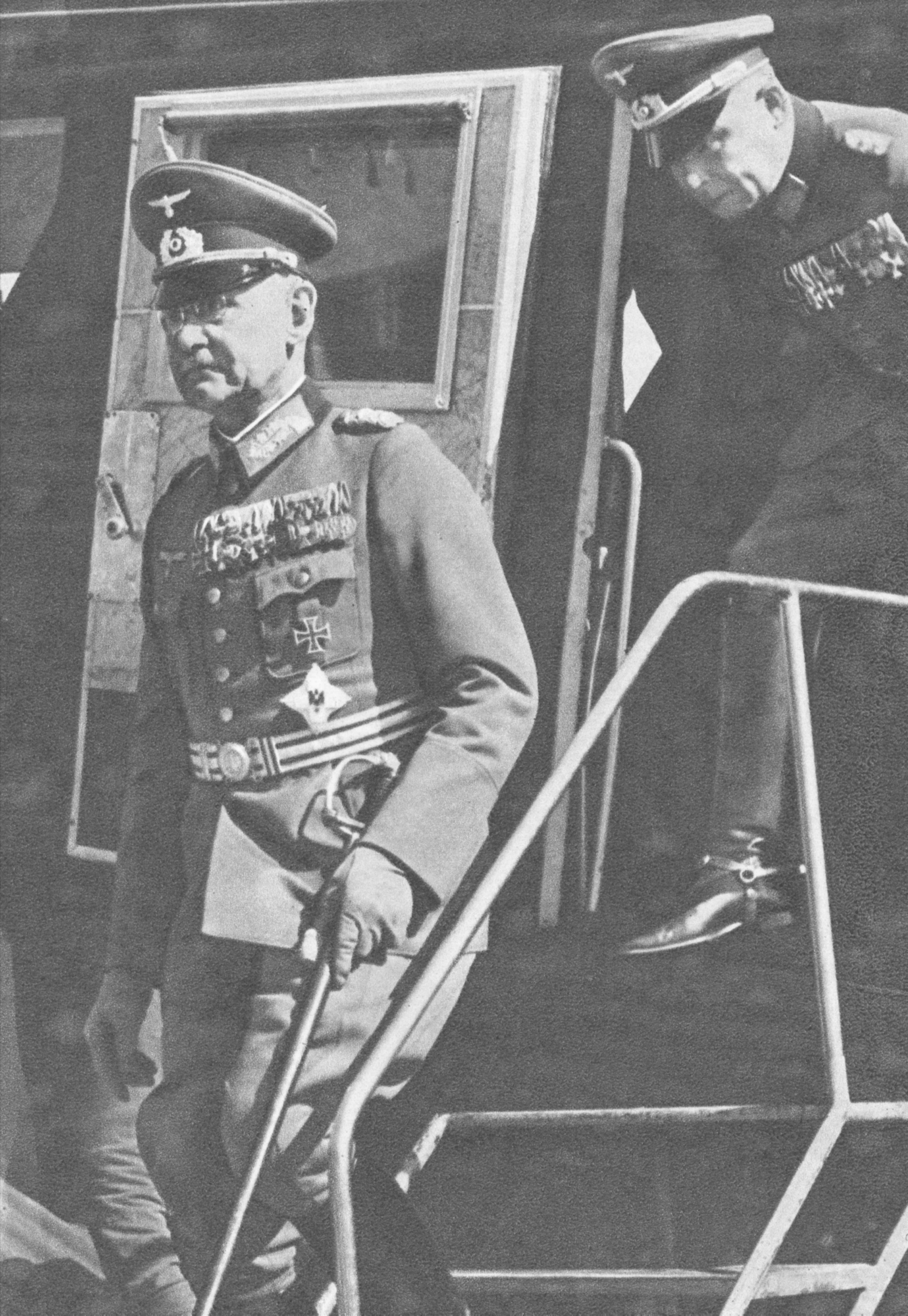 Saksan puolustusvoimien esikuntapäällikkö kenraali Halder astuu lentokoneesta Malmin lentokentälle Suomen-vierailunsa alkaessa.